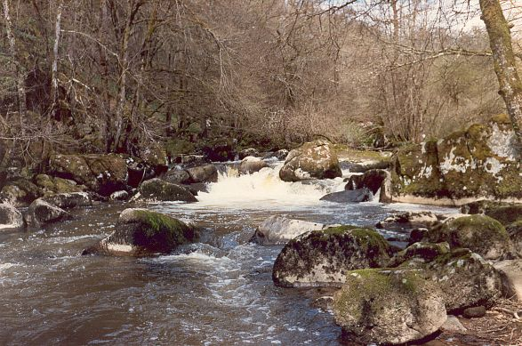 La Brame, au dessus du Saut, en hiver